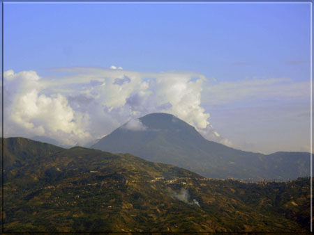 Vista en Sud Yungas